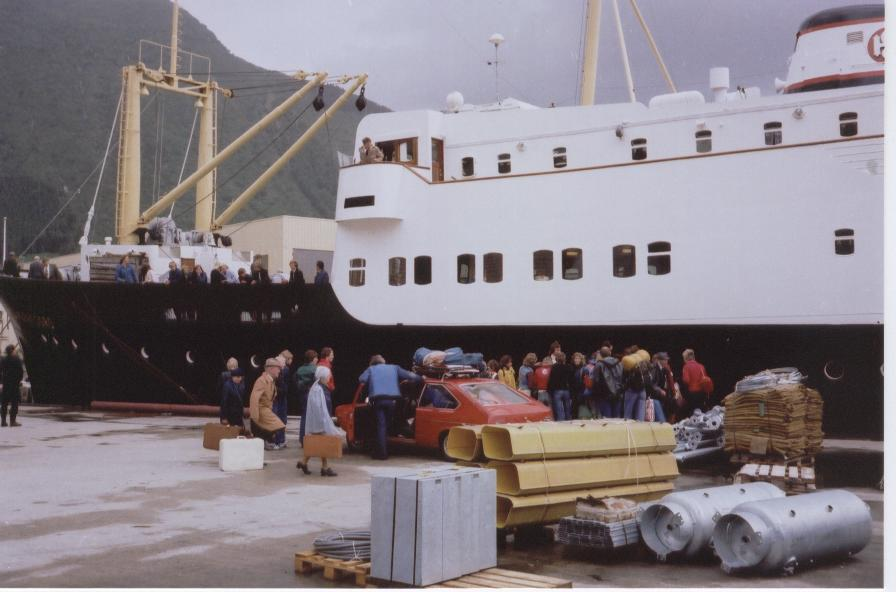 MS Hardangerfjord, built 1959